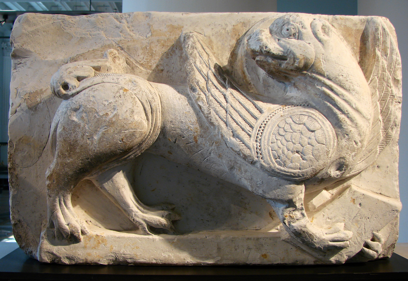 Bas-relief représentant un lion, Picardie, vers 1260.Peut-être un élément de tympan symbolisant l'évangéliste Marc. Musée de Picardie à Amiens.